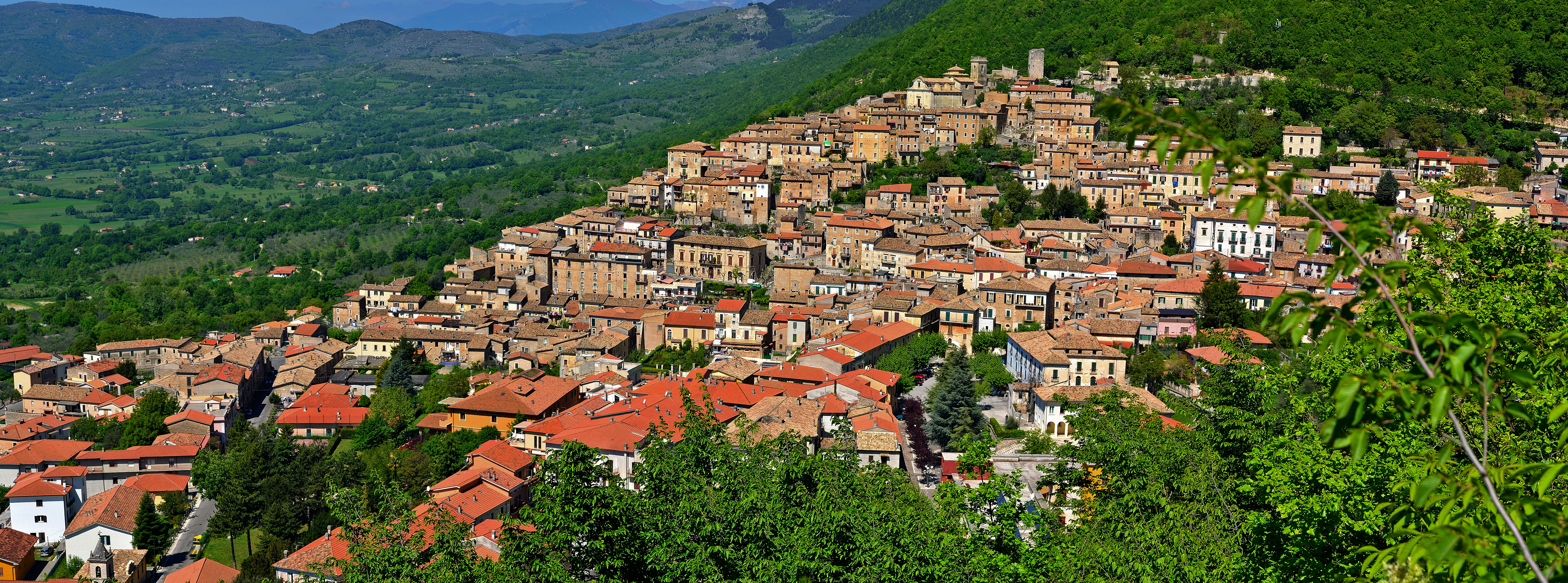 Nella foto è possibile vedere l'estensione del paese a valle